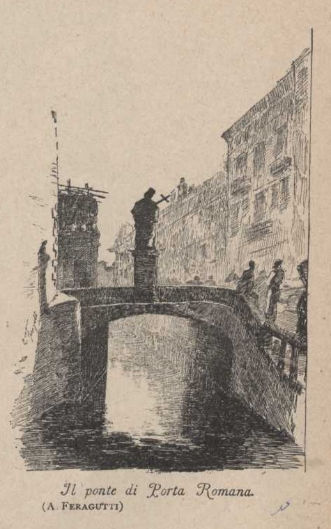 Il ponte di Porta Romana tratto da l naviglio : strenna del Pio Istituto dei Rachitici di Milano